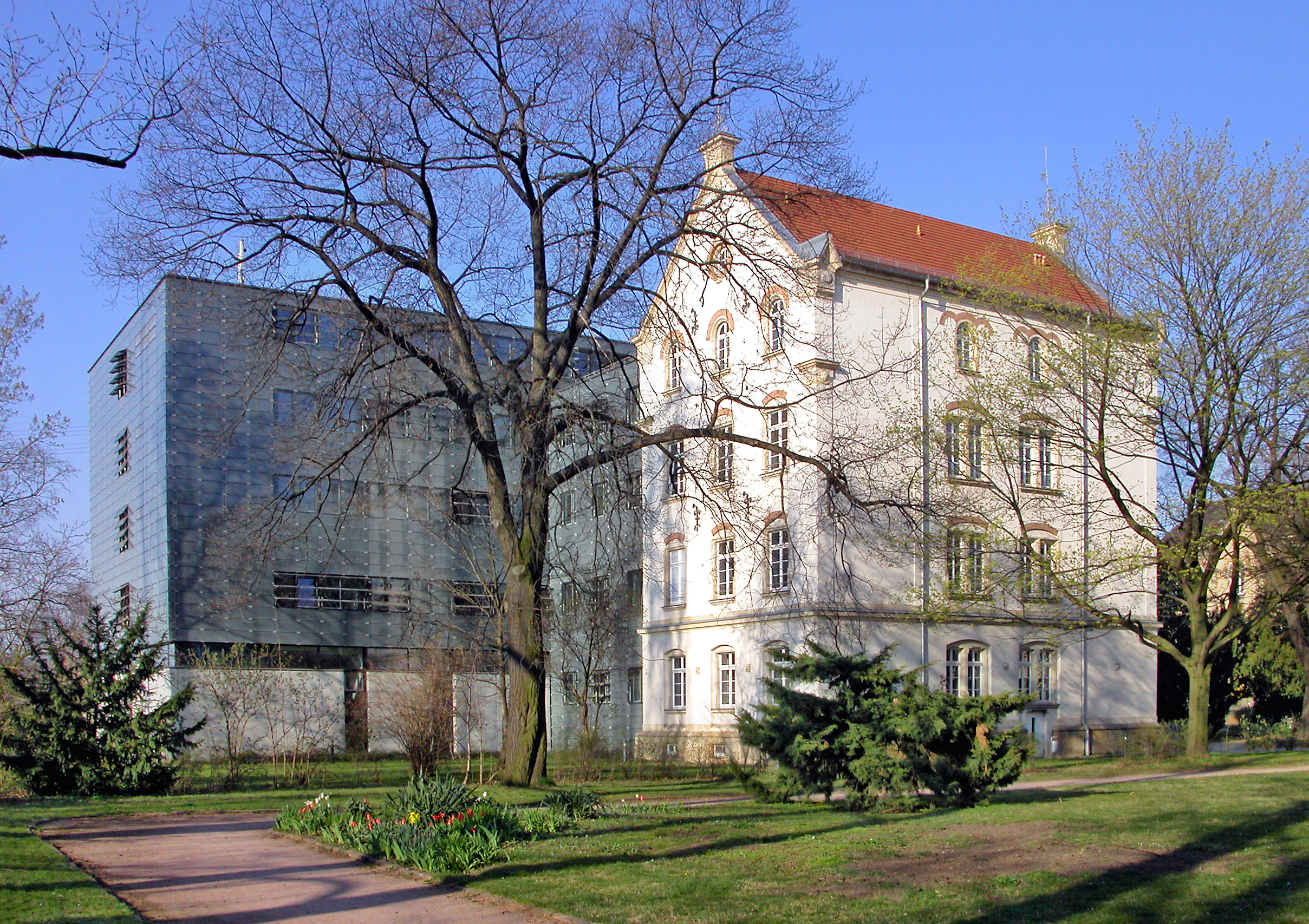 01.04.2007 01159 Dresden-Löbtau: Geriatrische Rehabilitationsklinik Altonaer Straße 2a (GMP: 51.048912,13.713051). Sicht aus dem Park von Nordosten. [DSCN21786.TIF]20070401105DR.JPG(c)Blobelt